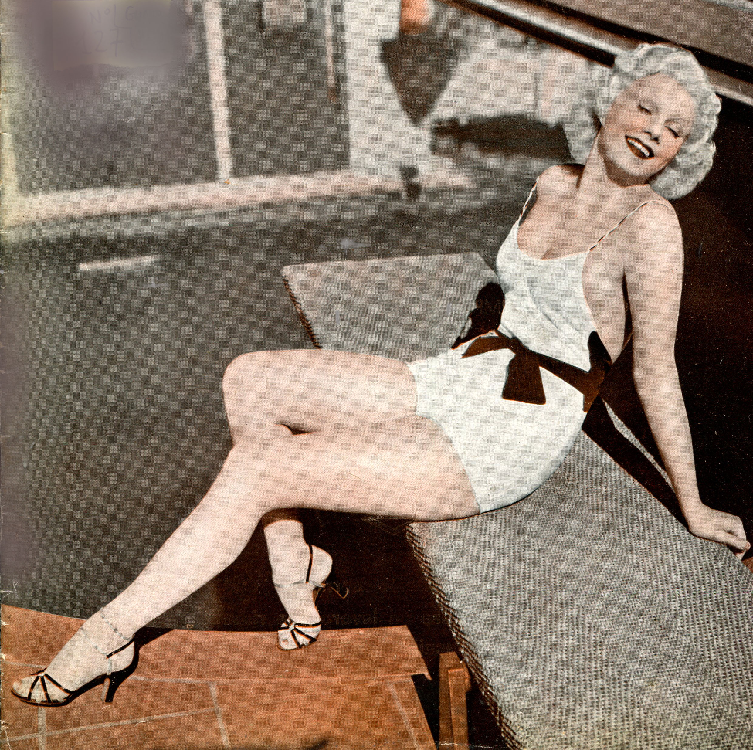 L'attrice Jean Harlow in un'immagine pubblicata in Italia nel 1934